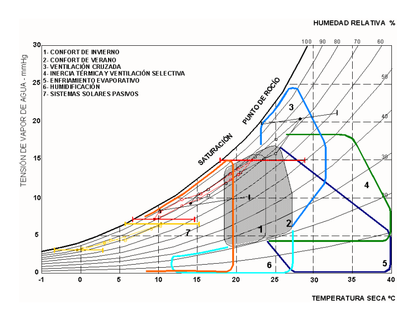 Climograma de Baruch Givoni aplicado a los climas muy cálido, templado y muy frío húmedos de la Argentina